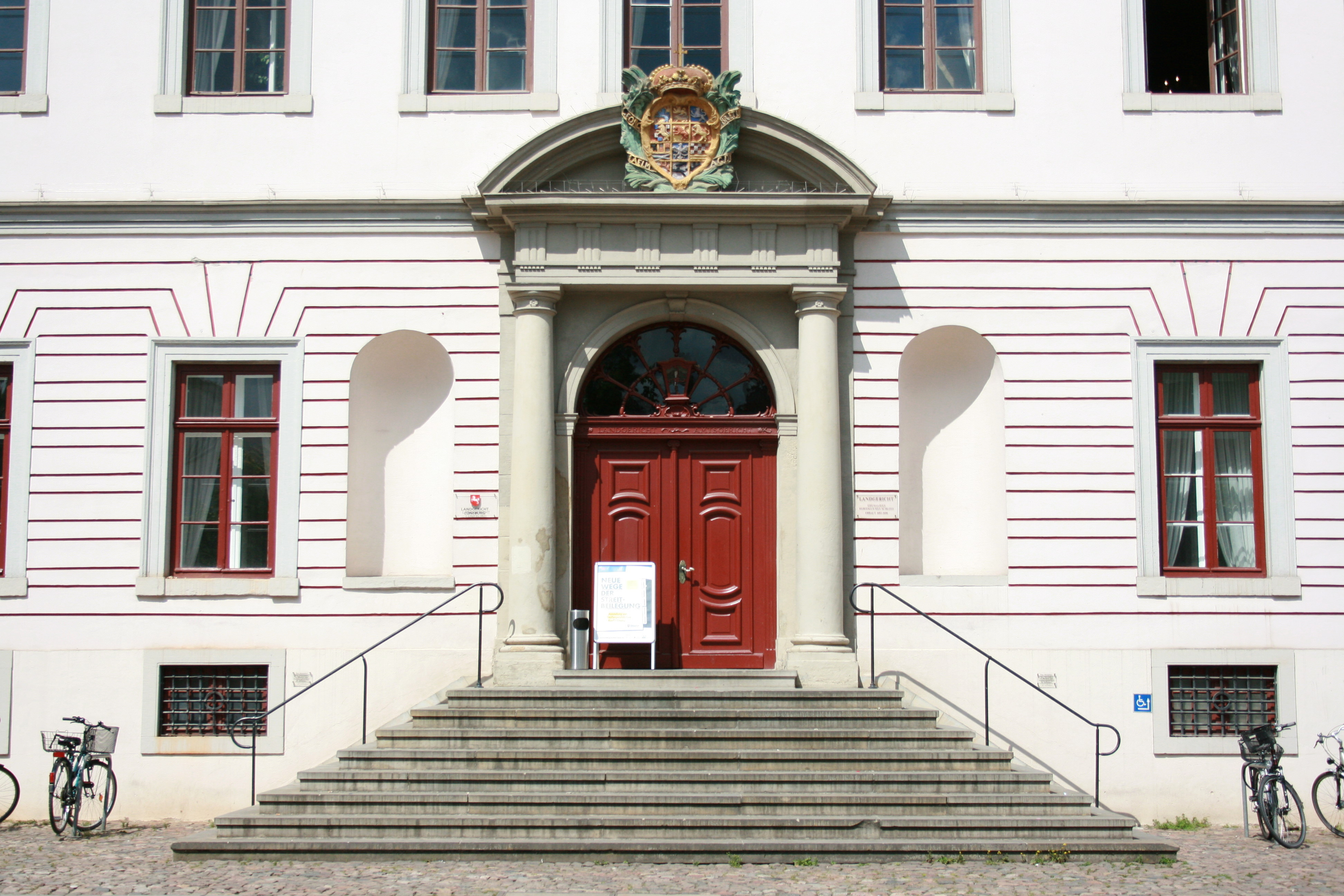 Landgericht, Am Markt in Lüneburg